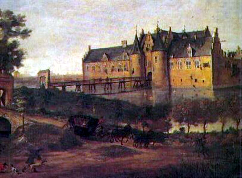 Kasteel Toutenburg. Uit: merkwaardige kasteelen in Nederland / door Van Lennep en Hofdijk, 1995. Fotomech. herdr. van de 2e dr., verzorgd door W.J. Hofdijk: Leiden : Brill ; Van Doesburgh, 1883-1884. - Oorspr. uitg.: Amsterdam : Tielkemeijer, 1854-1861 (via G. van Diest)